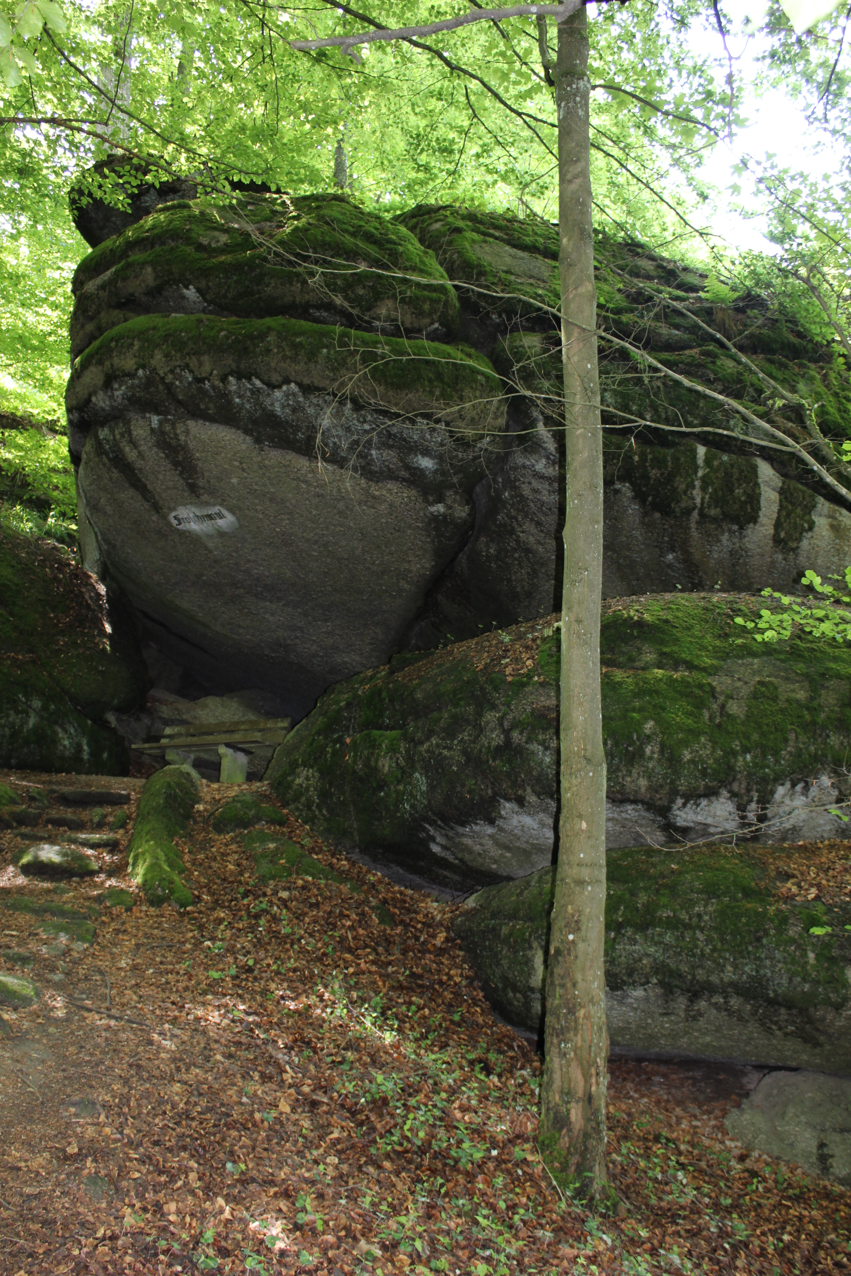 Das Froschmaul ist eine Felsformation im Felsengarten an der Burg Falkenstein im Landkreis Cham. Es gehört zu den Geotopen im Landkreis Cham mit de Nr. 372R044.